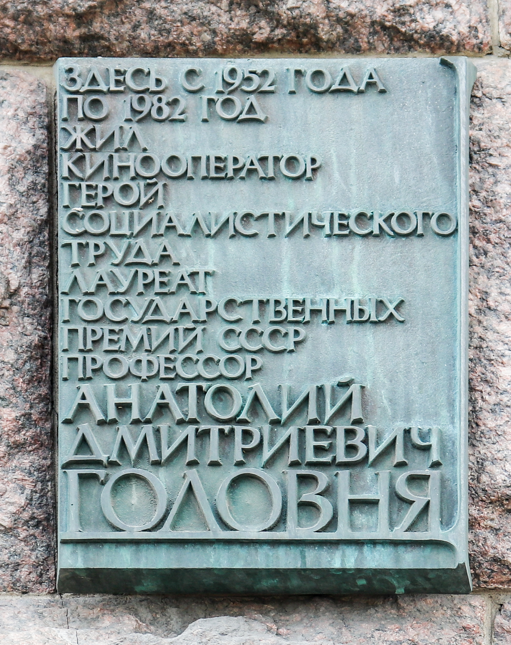 Мемориальная доска советскому кинооператору Анатолию Головне (1900—1982). Доска из бронзы была установлена в 1983 году на фасаде высотного здания на площади Красных Ворот (Садовая-Спасская улица, 21/1).